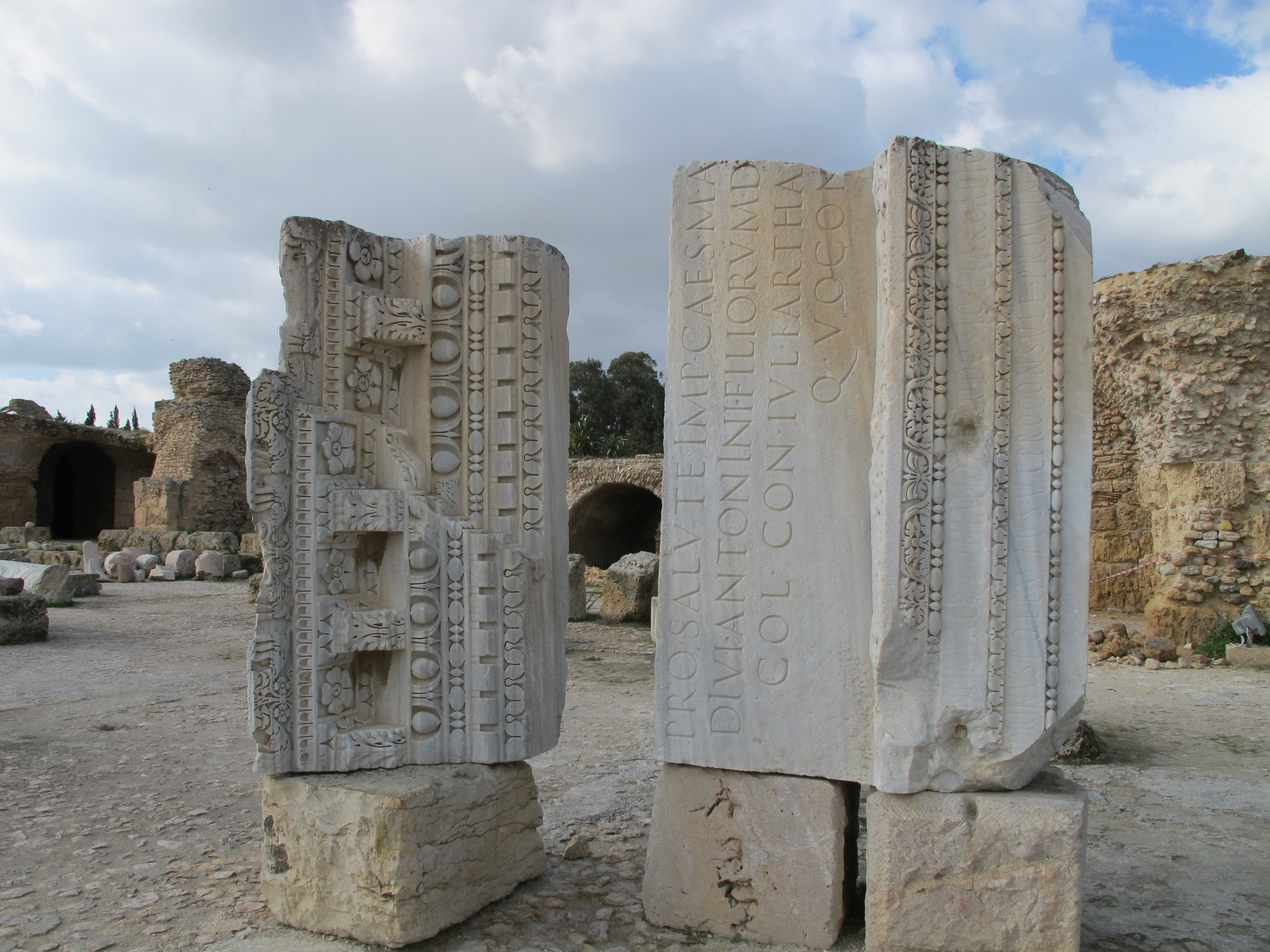 Reliefs in den Pius-Antoninus-Thermen, Karthago